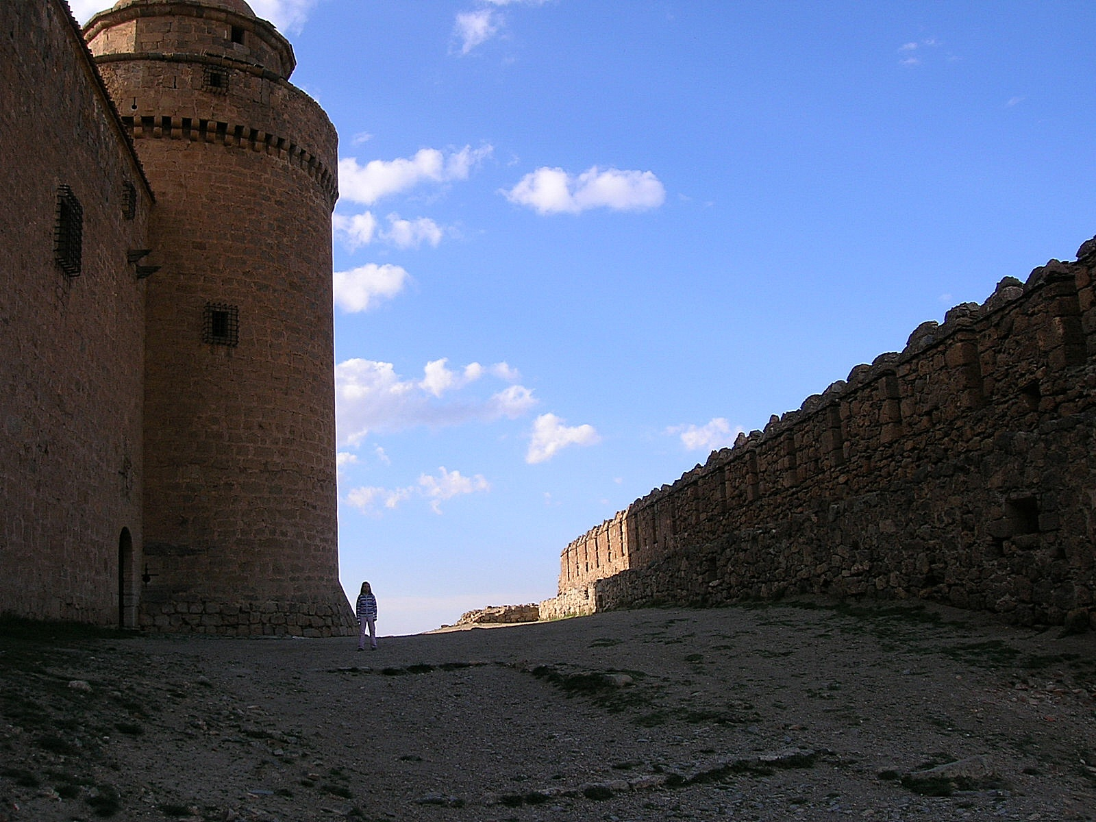 Torreón y muralla frente a la puerta de entrada del castillo de La Calahorra. Cámara Nikon 4600